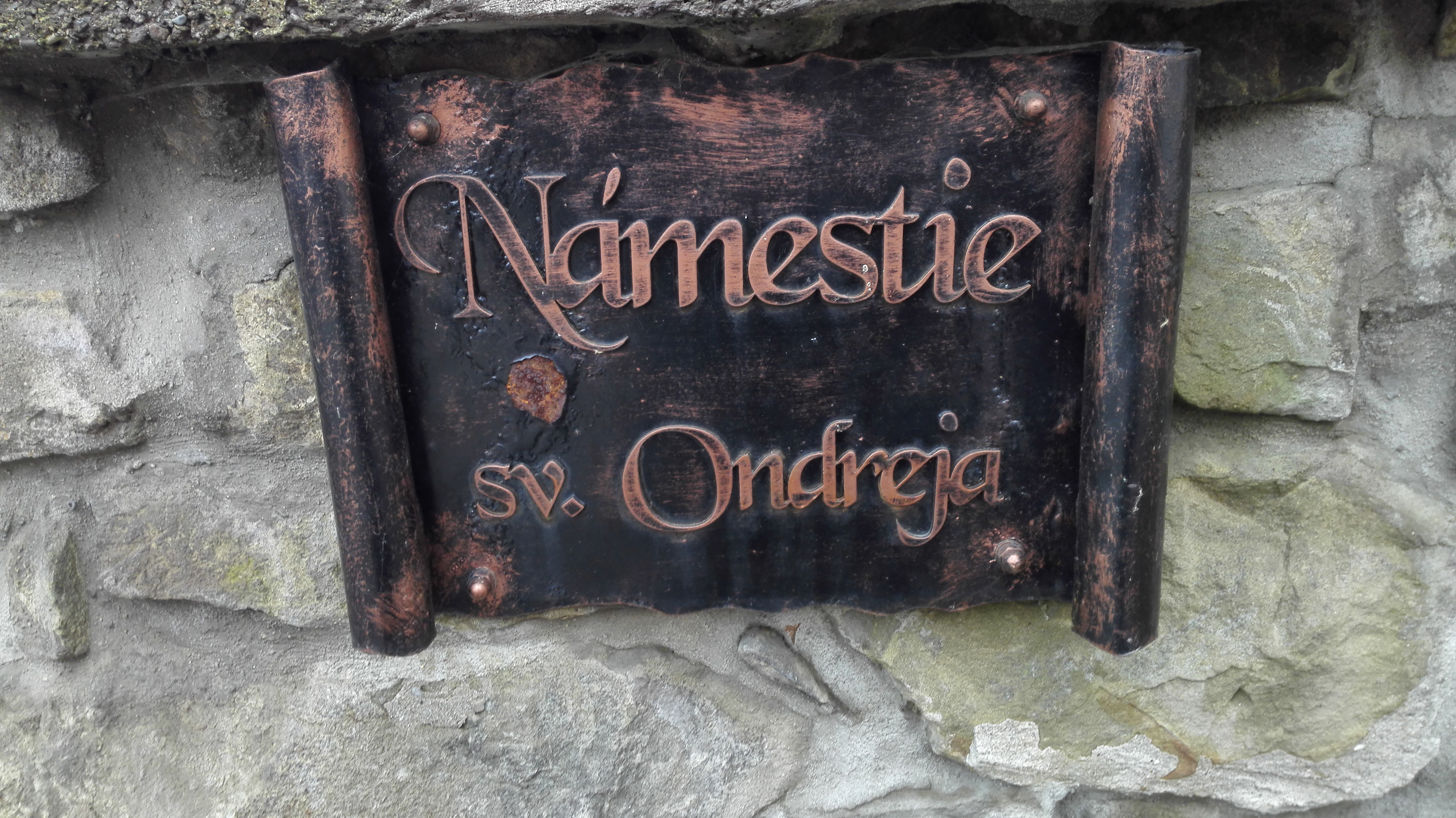 Tabuľa s nápisom názvu Námestia sv. Ondreja, odhalená pri príležitosti otvorenia pešej zóny a premenovania námestia v roku 2011.